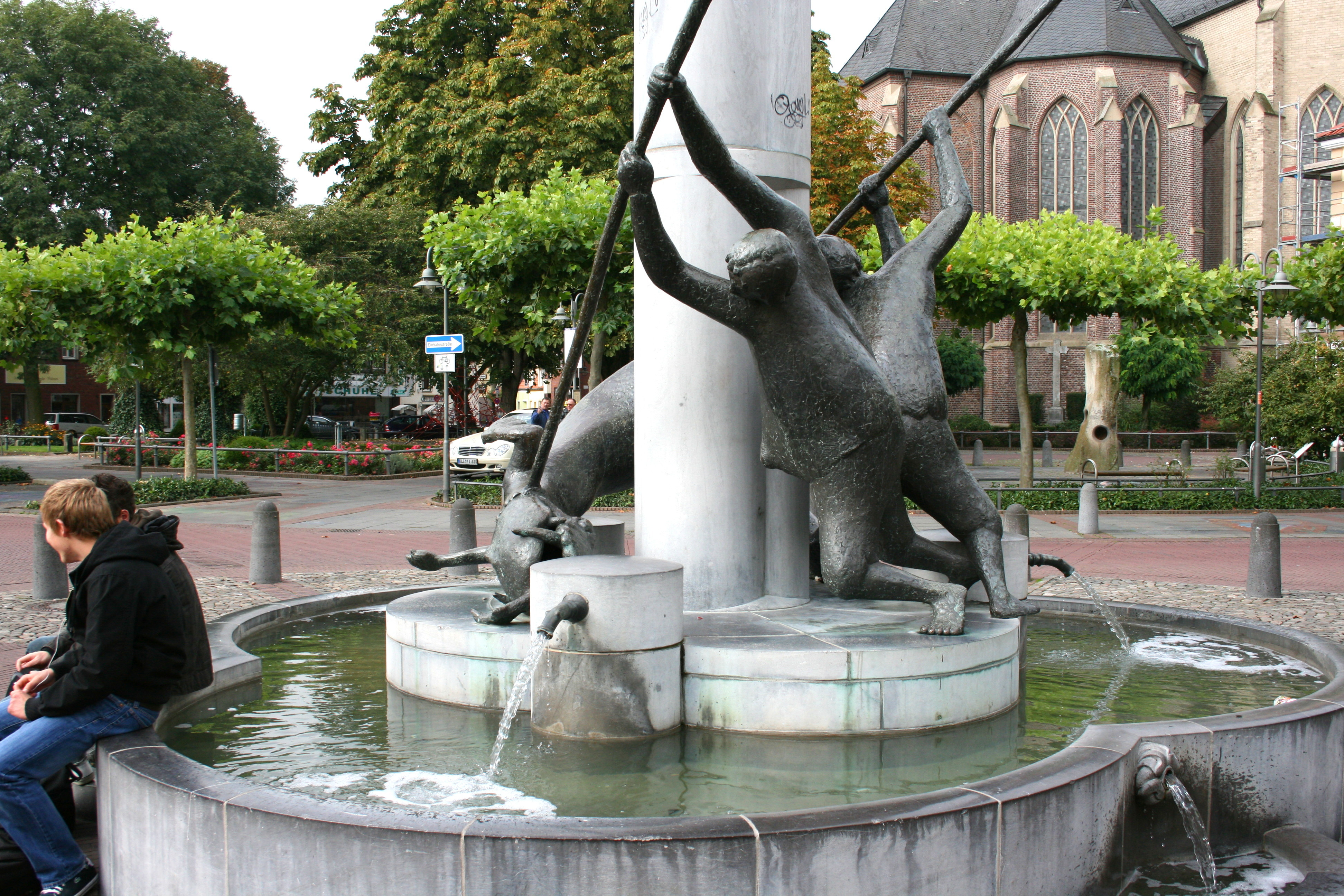 Drachenbrunnen auf dem Markt in Geldern